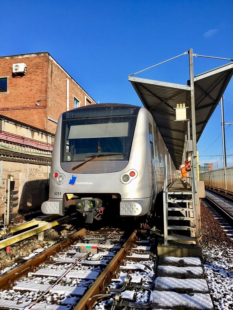 Rame de métro Boa (Bruxelles)